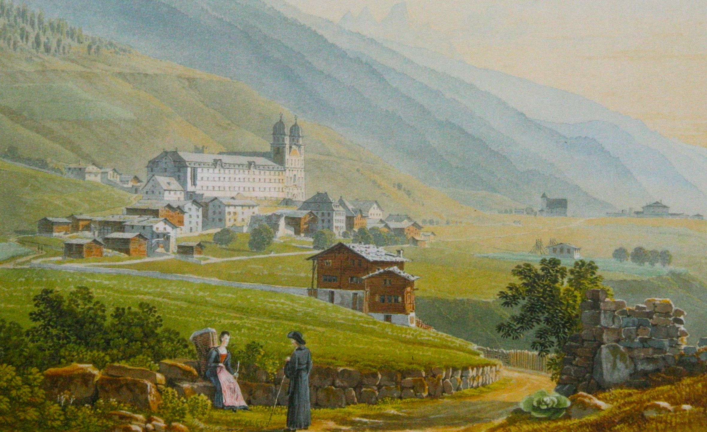 Disentis/Mustér 1821; rechts hinten Schloss Caschliun, links davon Kirche St. Placi